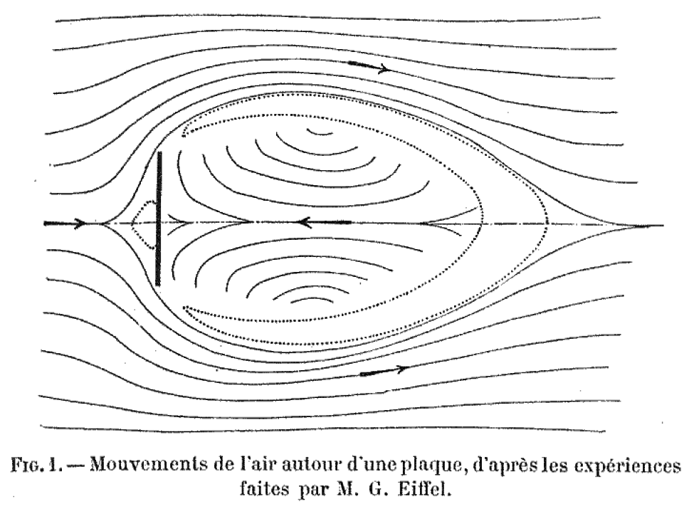 Écoulement sur un plaque carrée face au vent, Eiffel, La résistance de l'air, examen des formules et des expériences. Eiffel et ses collaborateurs ont relevé la direction des filets d'air avec "un fil court et très léger, porté à l'extrémité d'une tige mince, [en repérant] aussi exactement que possible la position et la direction du fil."